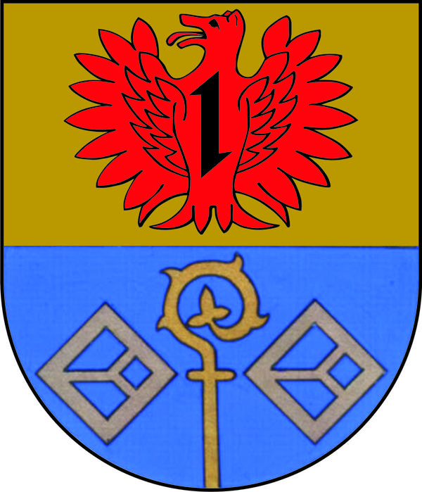 Wappen von Oberkirn